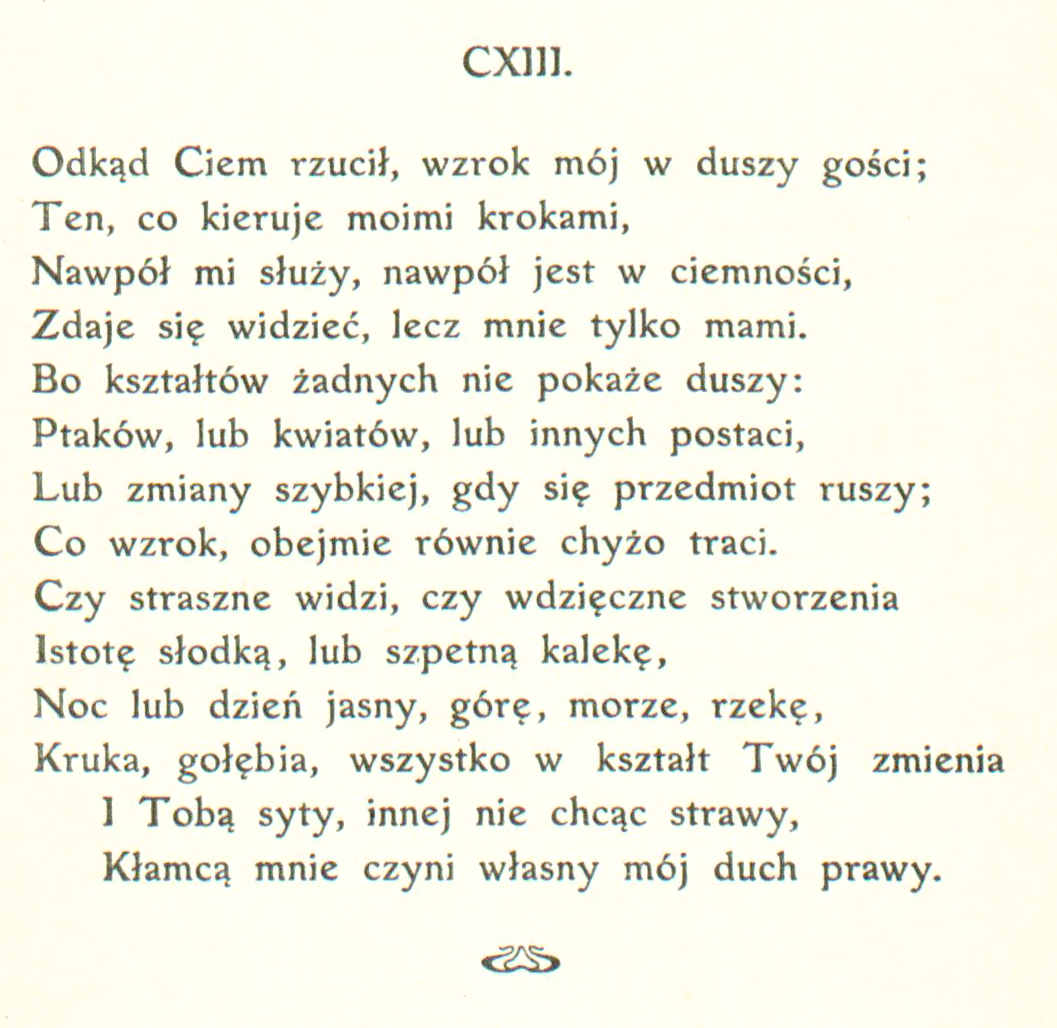 Sonety Shakespeare'a I-CXXXIV i CXXXVII-CLIV tłumaczenie Maria Sułkowska (MUS) sonet 113 strona 127